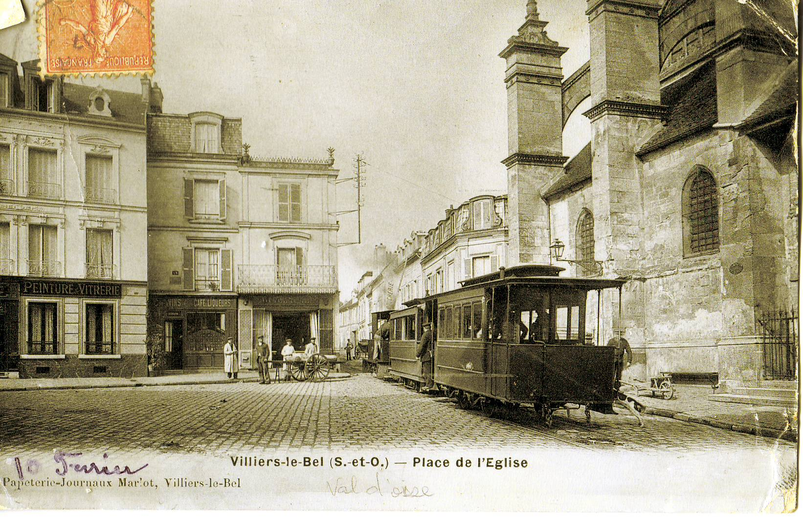 Carte postale ancienne éditée par "Papèterie-journaux Marlot" à Villiers-le-Bel VILLIERS-LE-BEL : Place de l'église Vue en gros plan du tramway de Villiers-le-Bel